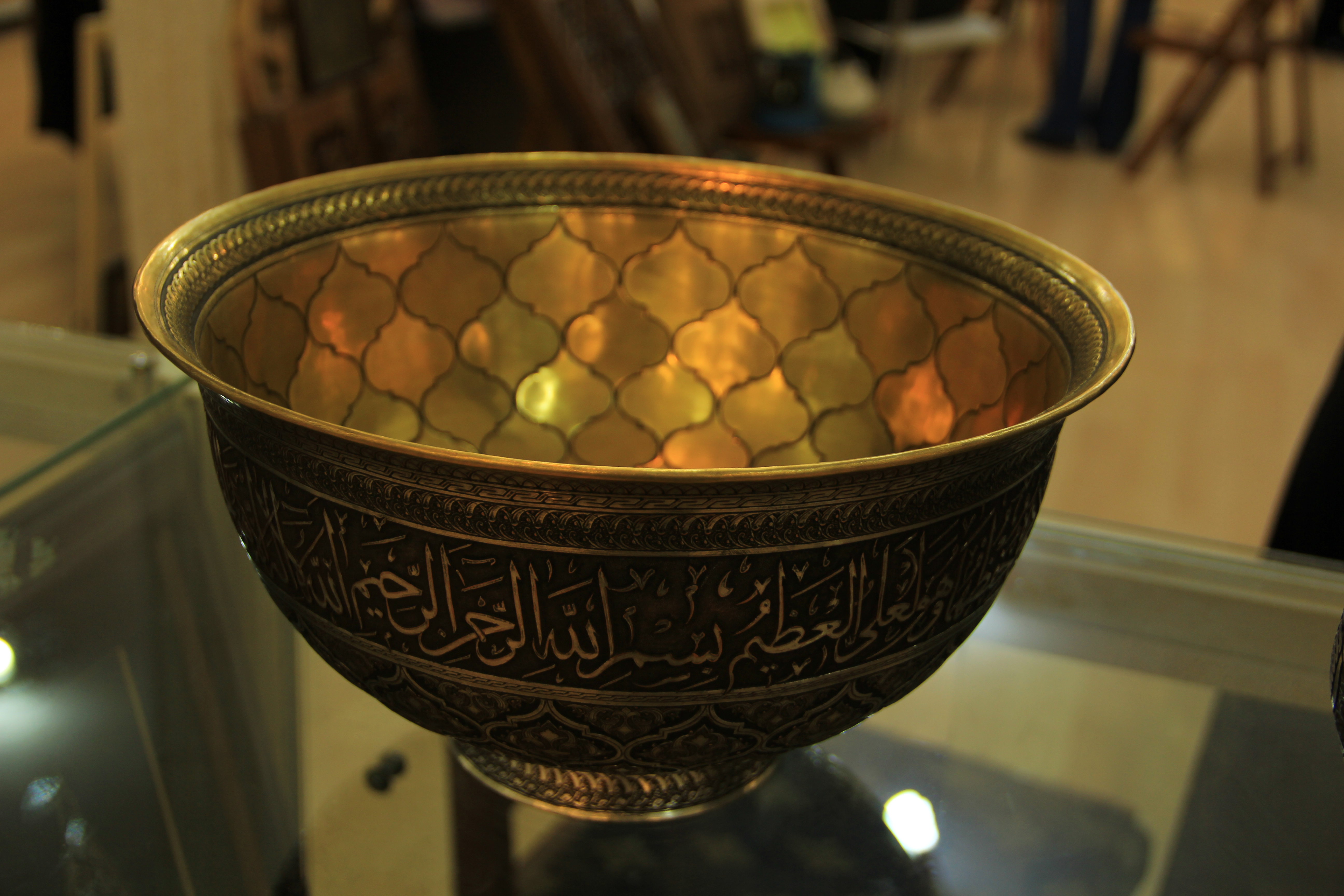 قلمزنی- تفرش- استاد میرفخرایی- استان مرکزی- ابوالفضل بختیاری